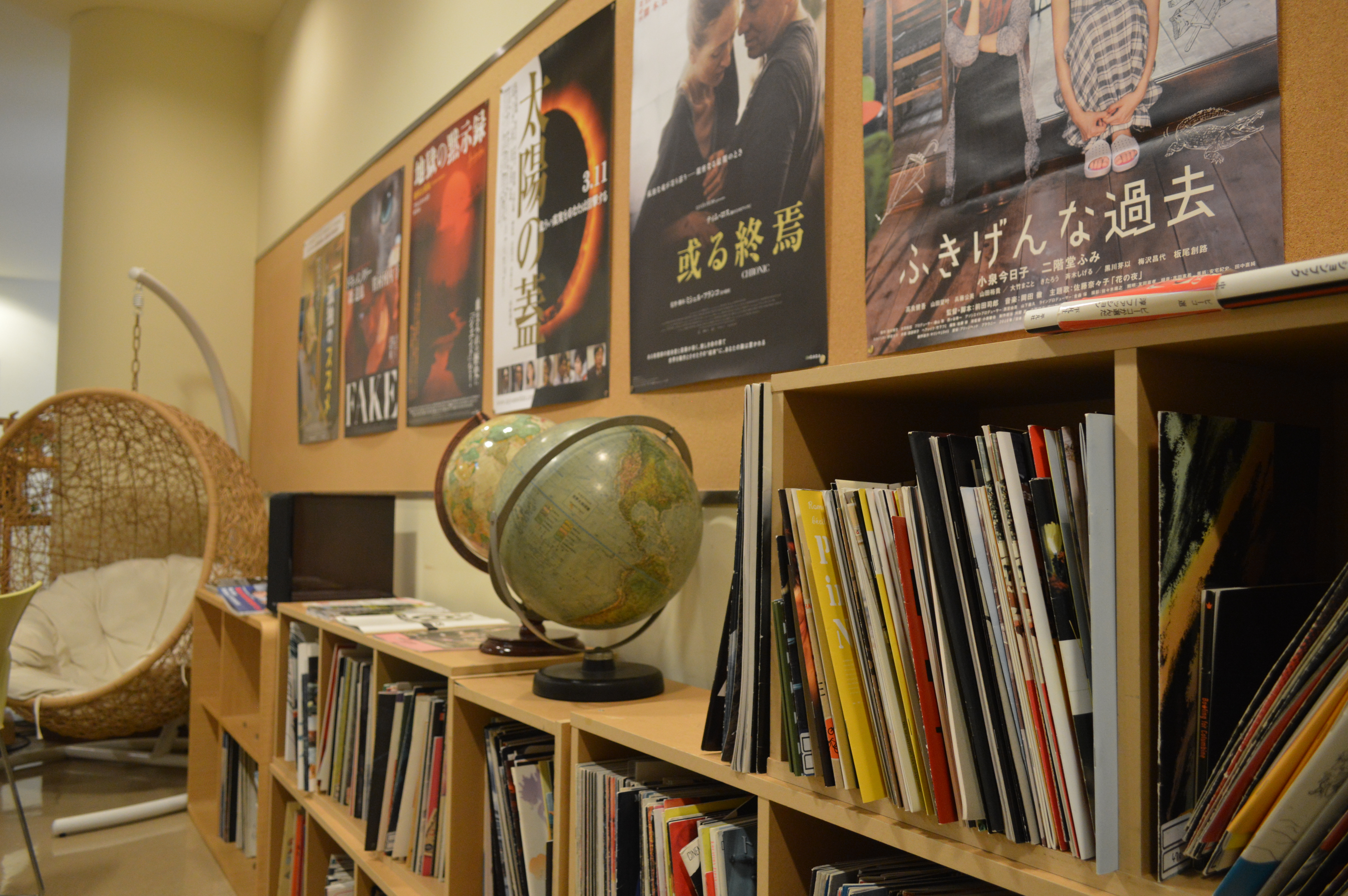 富山市の映画館「フォルツァ総曲輪」（2016年9月末で休館）。2016年7月末に撮影。